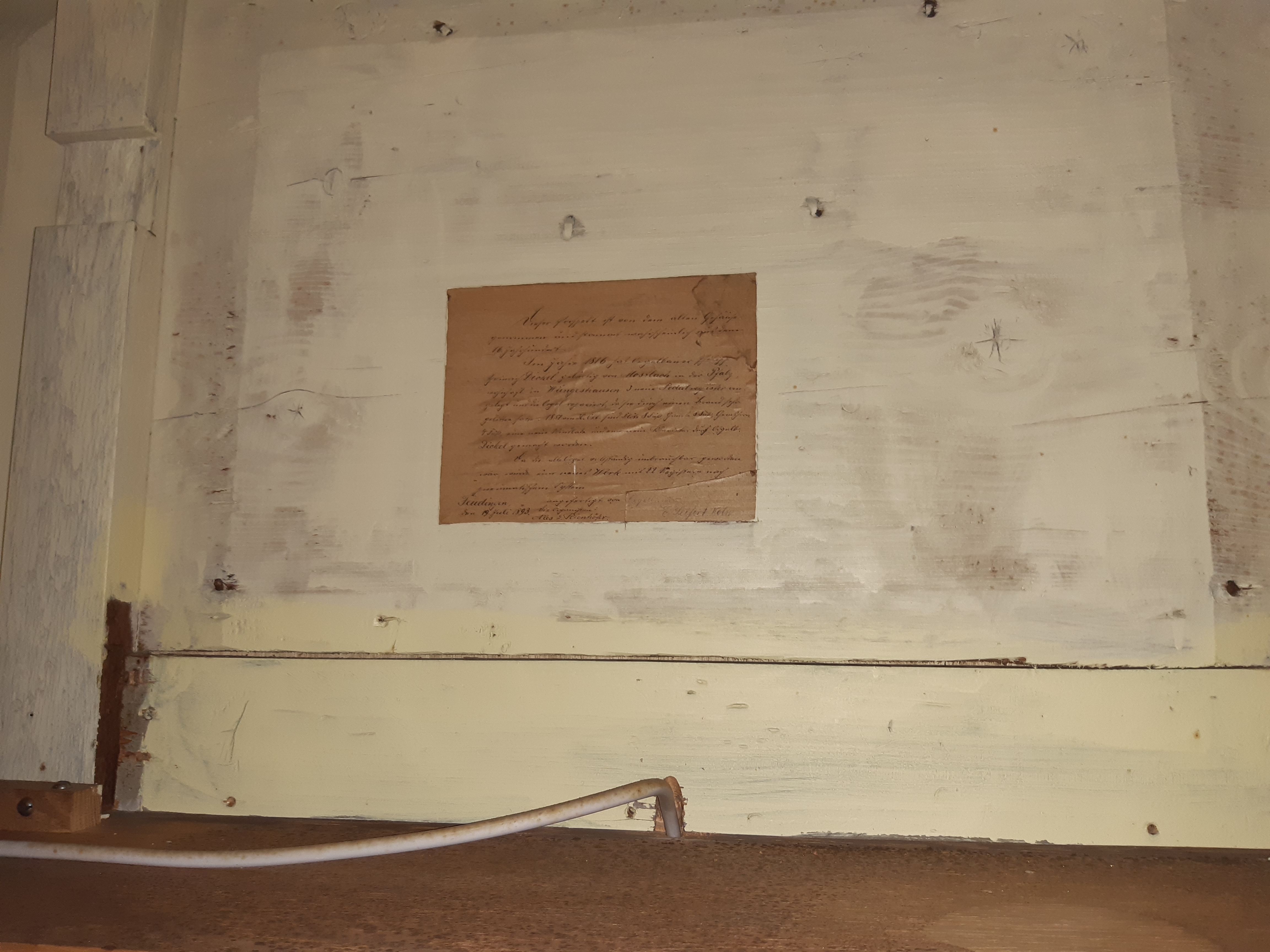 Inschrift des Orgelbauer Seifert aus dem Jahr 1893. Original erhalten.